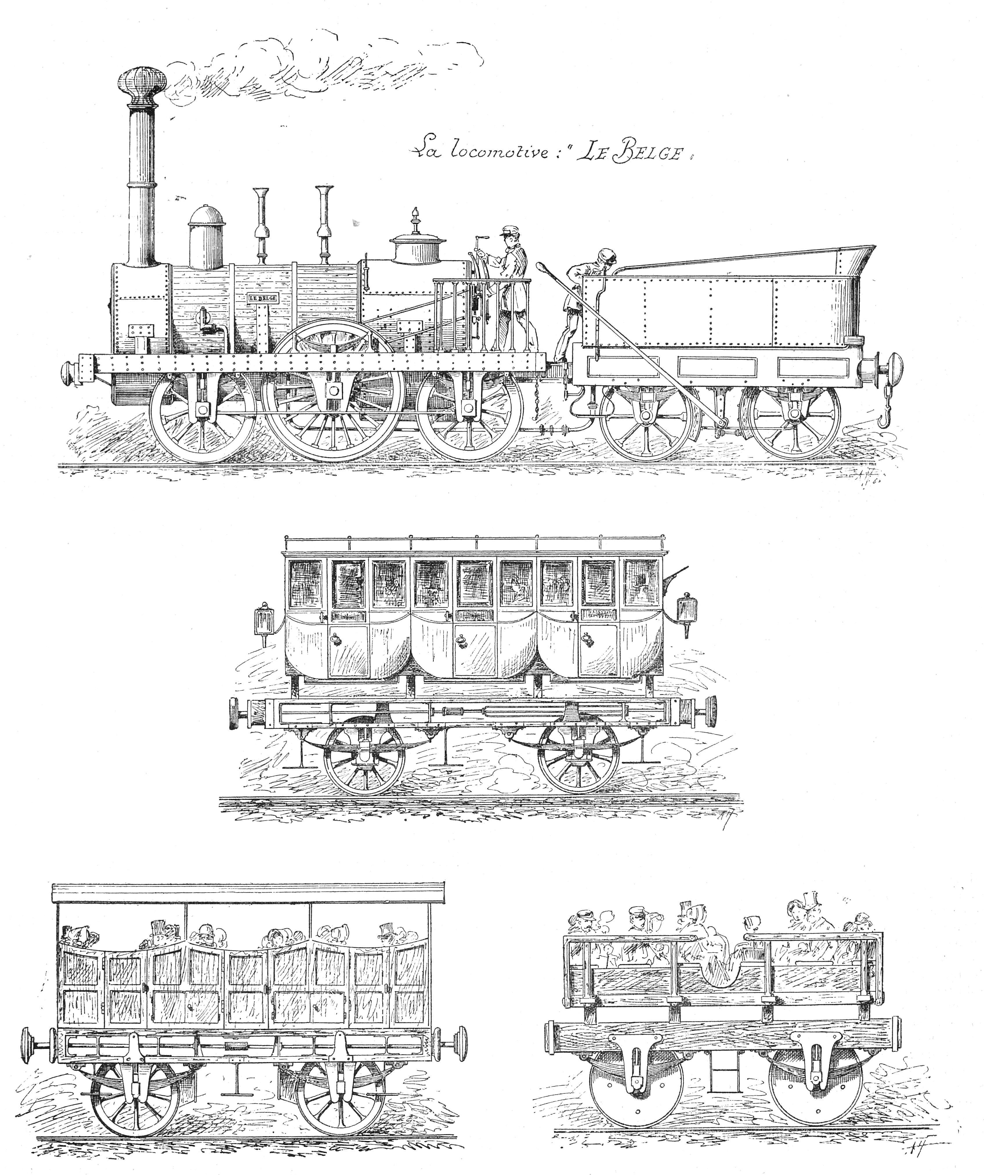 Types des premières voitures de la ligne de chemin de fer entre Bruxelles et Malines. La locomotive « Le Belge ».